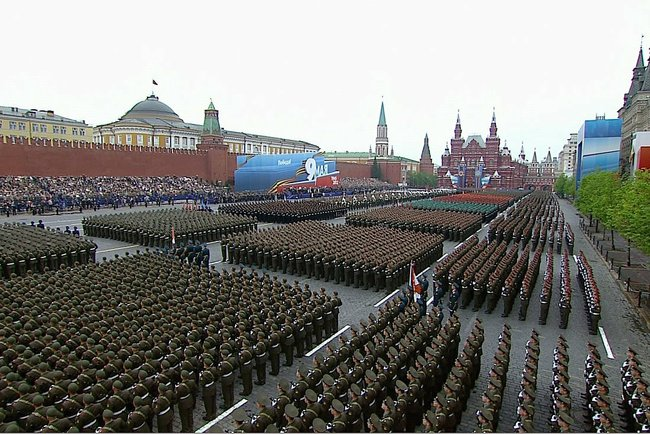 Перед началом военного парада на Красной площади в ознаменование 67-й годовщины Победы в Великой Отечественной войне.